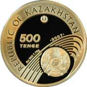 Памятная монета Республики Казахстан «Olympic Games 2008» из серии «Спорт» - Золото - 500 тенге - аверс